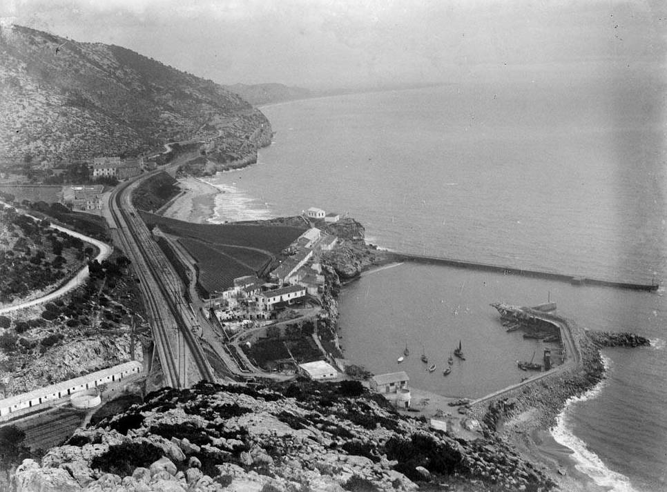 Vista de Garraf. Enric Ribas i Virgili (Entre 1920 i 1930)